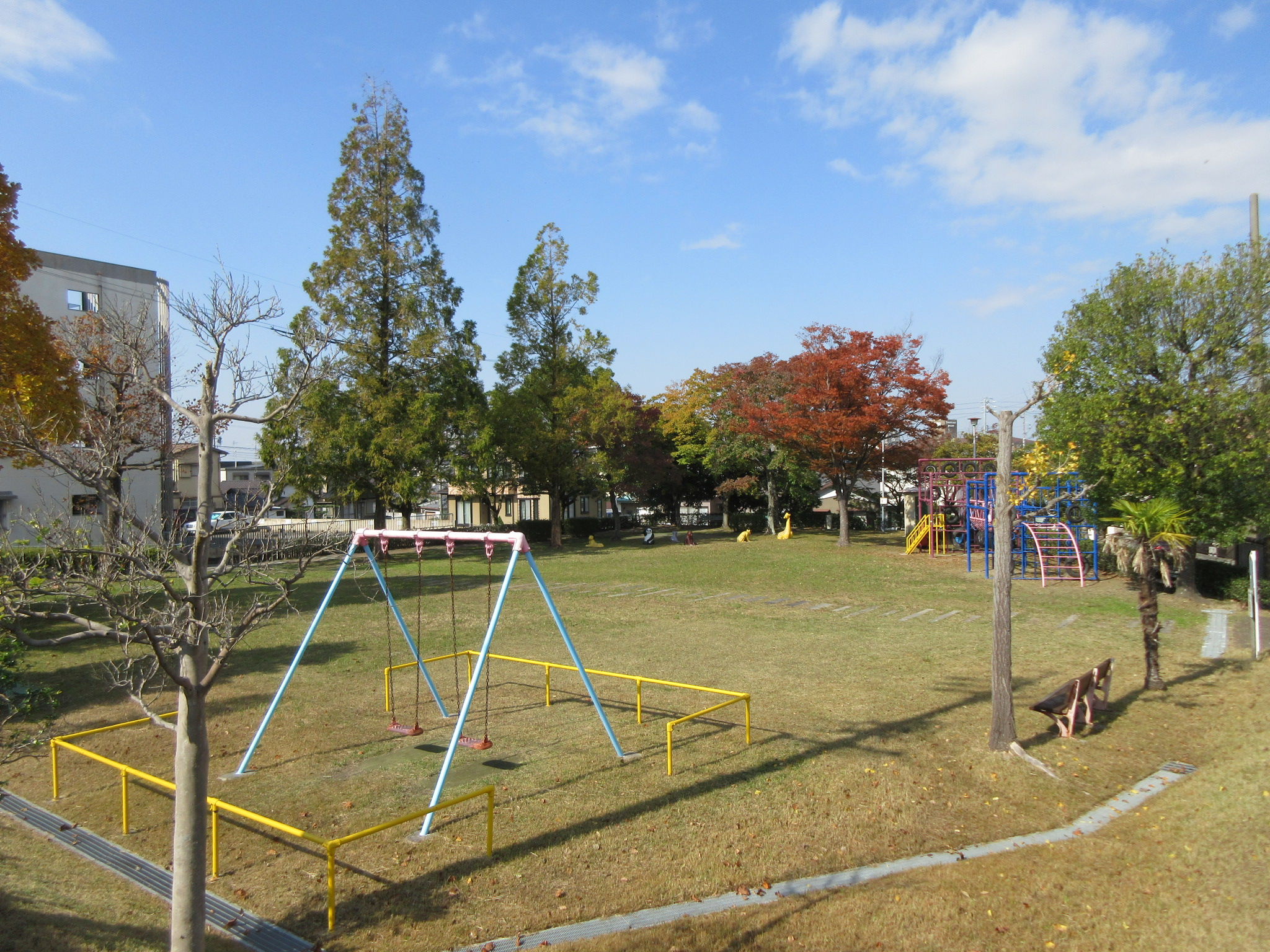 羽根田公園（岡崎市柱曙3丁目）